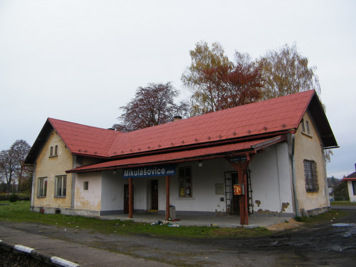 Mikulášovice střed